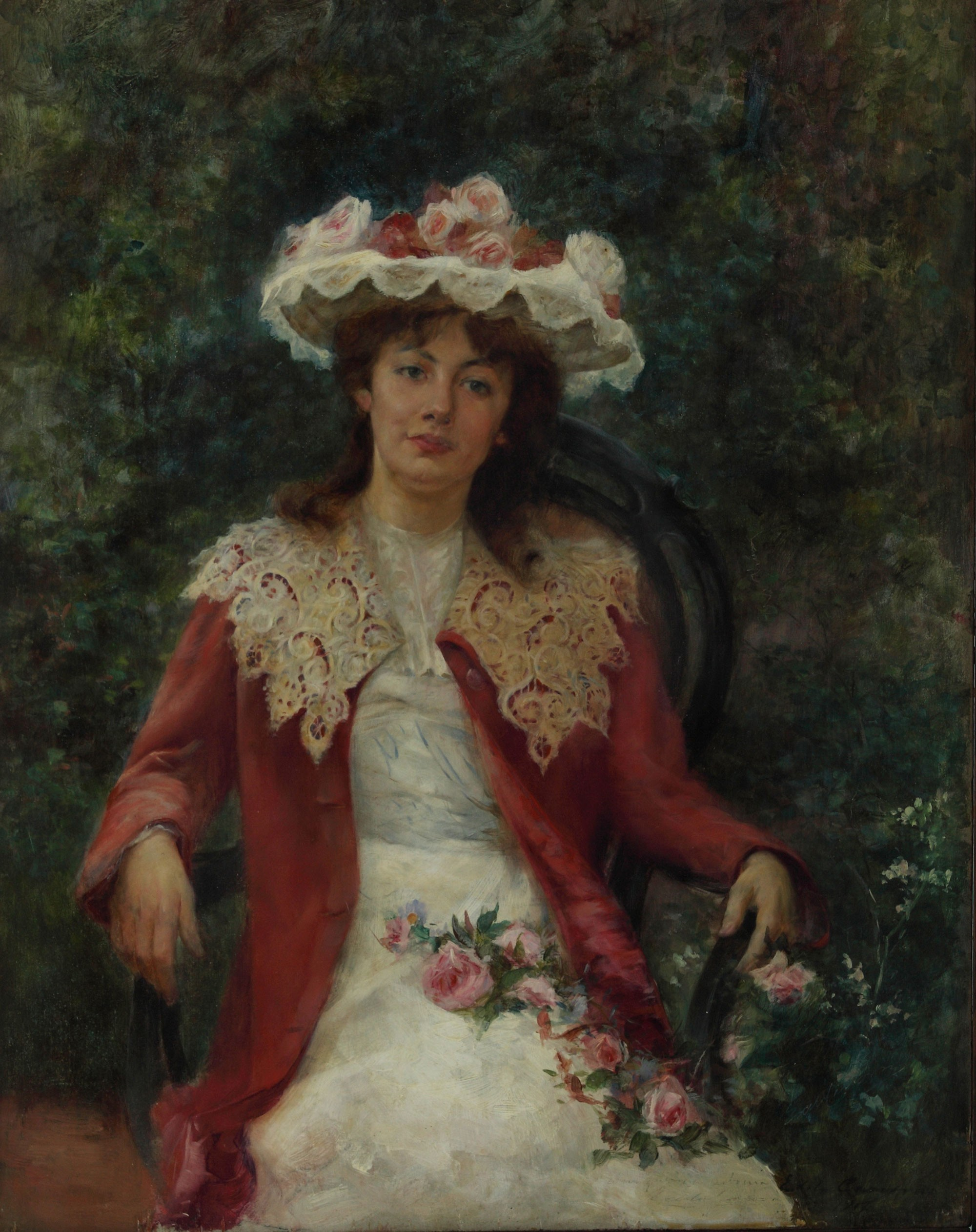 Ernesto de la Cárcova, En el jardín. 1902. 40 x 32 cm, óleo sobre madera. Inv. 5612.